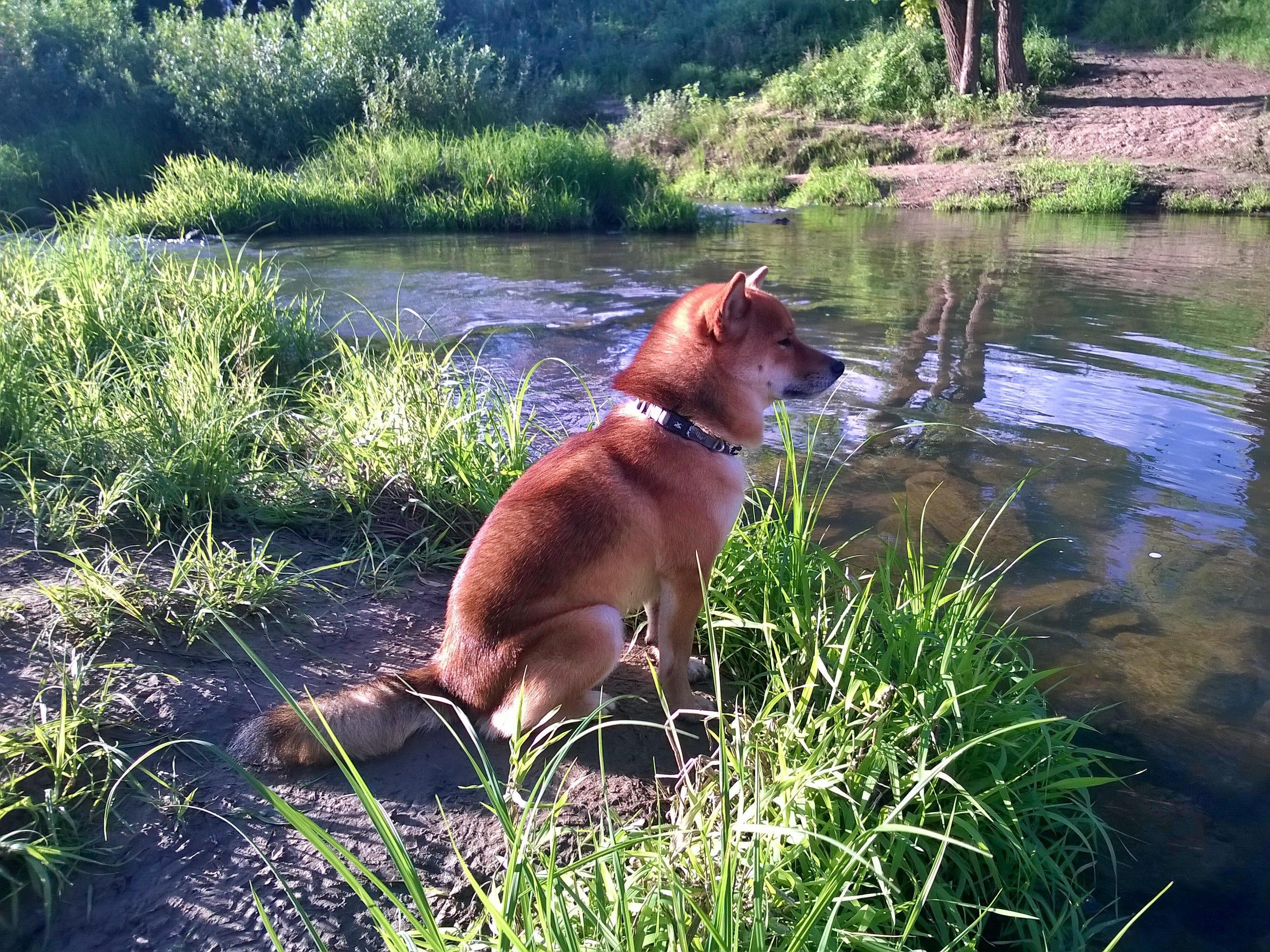 Сиба, сидя у кромки воды, созерцает вечерний летний речной пейзаж